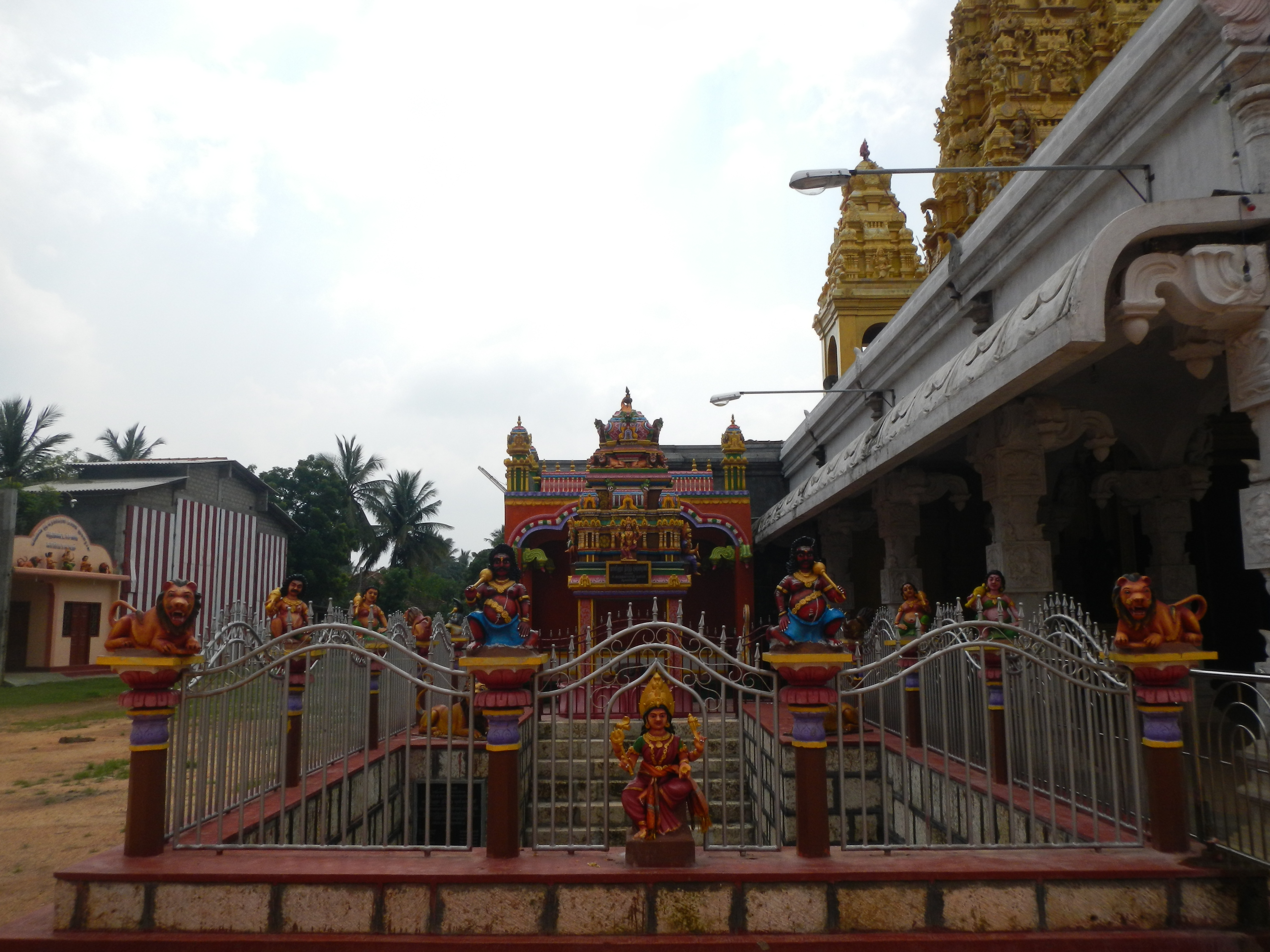 தீர்த்தக் கேணி